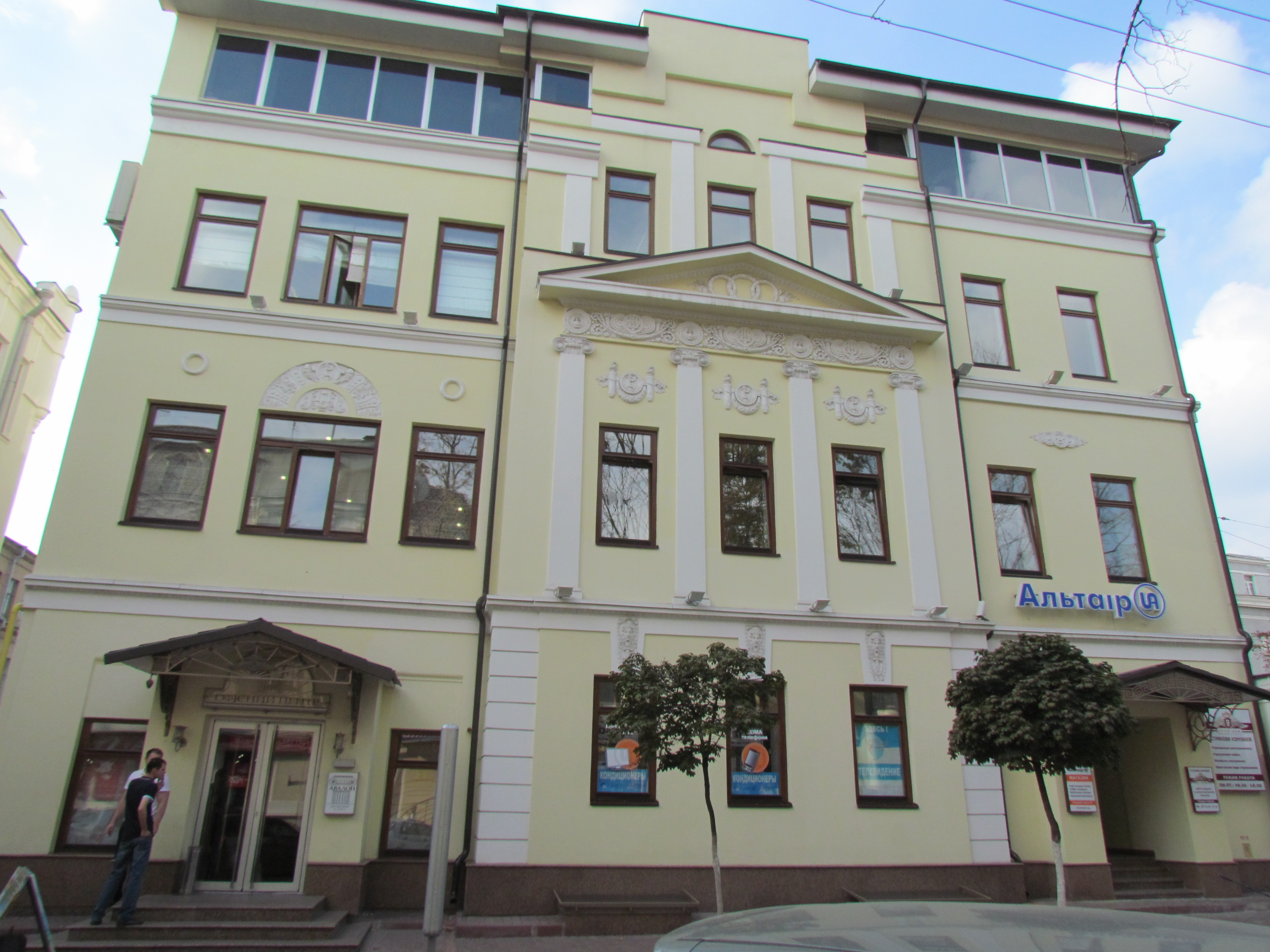 Україна, Харків, вул. Артема, 31